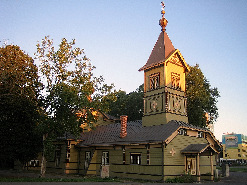 Püha Siimeoni ja naisprohvet Hanna kirik